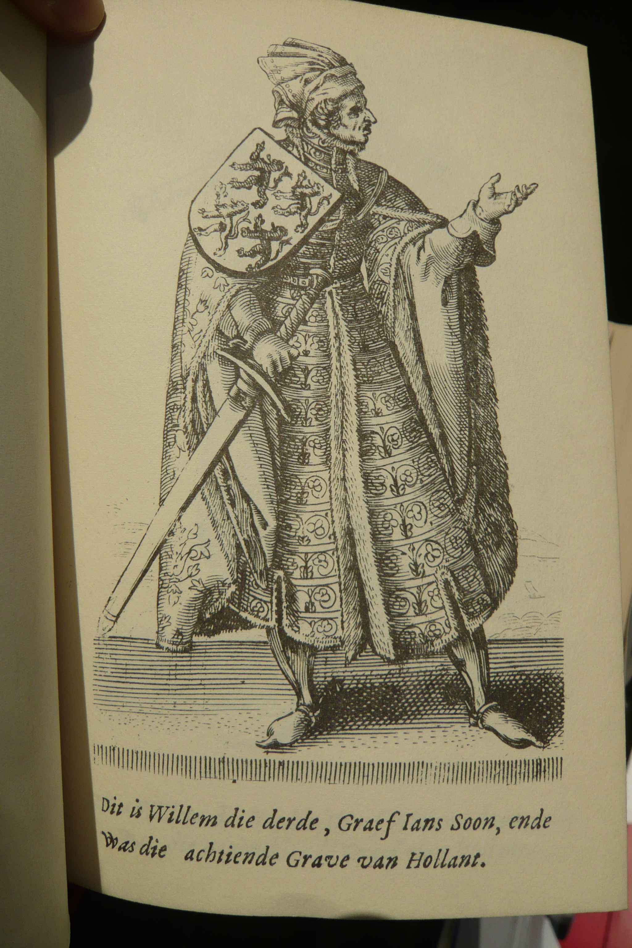 "32 afbeeldinge der Graven van HOLLANDT uit het oude goudtsche kronycxken: In 't kooper verciert door Adriaenus Matham t'Amsterdam By Ian Hendricksz Boom, Ioost Pluymer, en Casparus Commelijn, Anno 1663" Auteur Adriaen Matham, Uitgever Ian Hendricksz. Boom, Heruitgever: Wereldbibliotheek, 1968 Lengte 34 pagina's Dit is Willem die derde, Graef Ians Soon, ende was die achtiende Grave van Hollant.